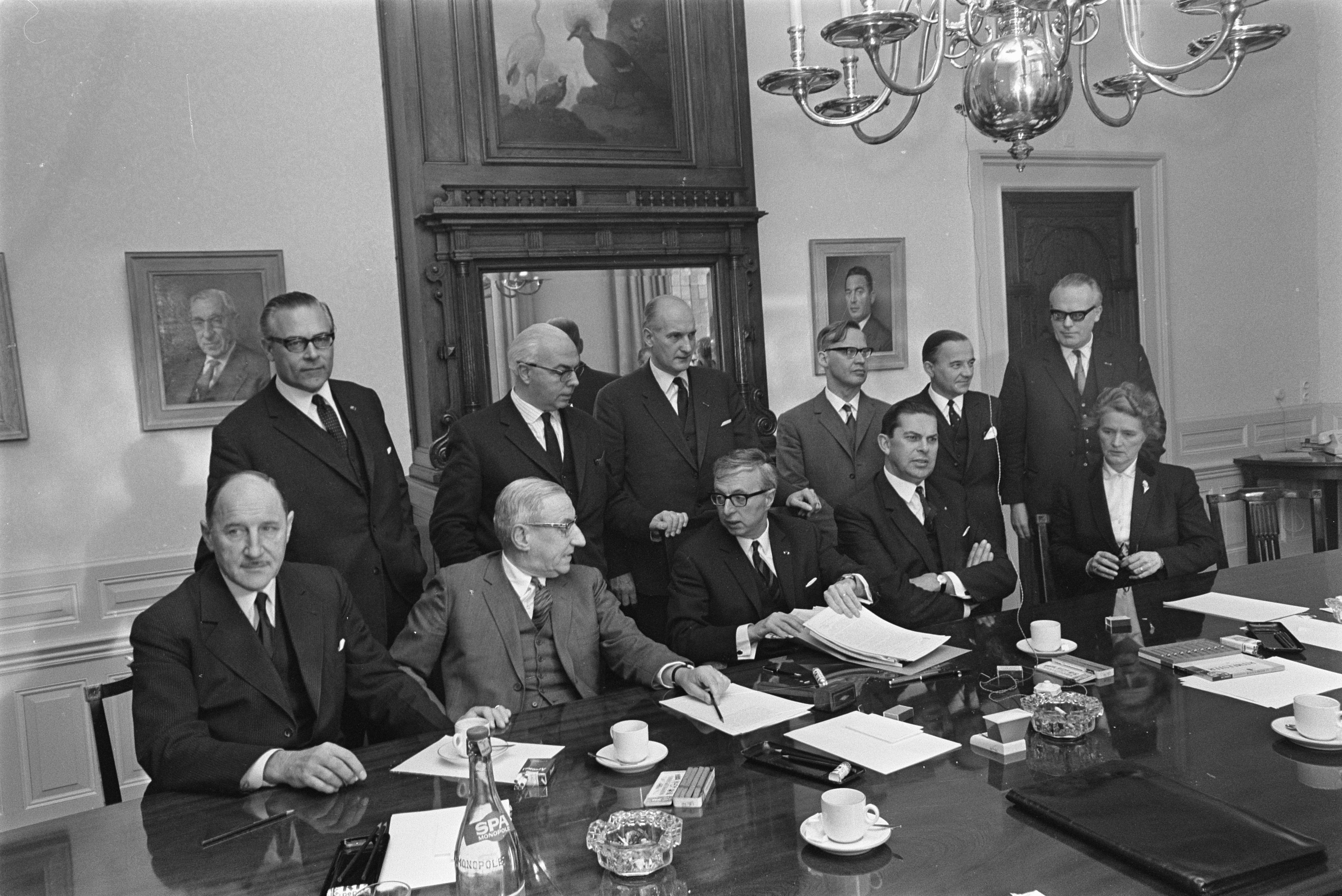 Collectie / Archief : Fotocollectie Anefo Reportage / Serie : Kandidaat-Ministers overleggen Beschrijving : V.l.n.r. mr. Joseph Luns (KVP), dr. J.E. de Quay (KVP), dr. Jelle Zijlstra (ARP), mr. Barend Biesheuvel (ARP), mw. dr. Marga Klompé (KVP), daarachter ir. H.B.J. Witte (KVP), dr. G.M.J. Veldkamp (KVP), mr. Th.H. Bot (KVP), prof. mr. Isaac Arend Diepenhorst (ARP) P.J.S. de Jong (KVP), prof. mr. P.J. Verdam (ARP) Datum : 21 november 1966 Locatie : Den Haag, Zuid-Holland Trefwoorden : ministers, politiek, regeringsvorming Persoonsnaam : Biesheuvel, Barend, Bot, Th.H., Diepenhorst, I.A., Jong, P.J.S. de, Klompé, Marga, Luns, Joseph, Quay, J.E. de, Veldkamp, G.M.J., Verdam, P.J., Witte, H.B.J., Zijlstra, Jelle Fotograaf : Fotograaf Onbekend / Anefo Auteursrechthebbende : Nationaal Archief Materiaalsoort : Negatief (zwart/wit) Nummer archiefinventaris : bekijk toegang 2.24.01.05 Bestanddeelnummer : 919-8074